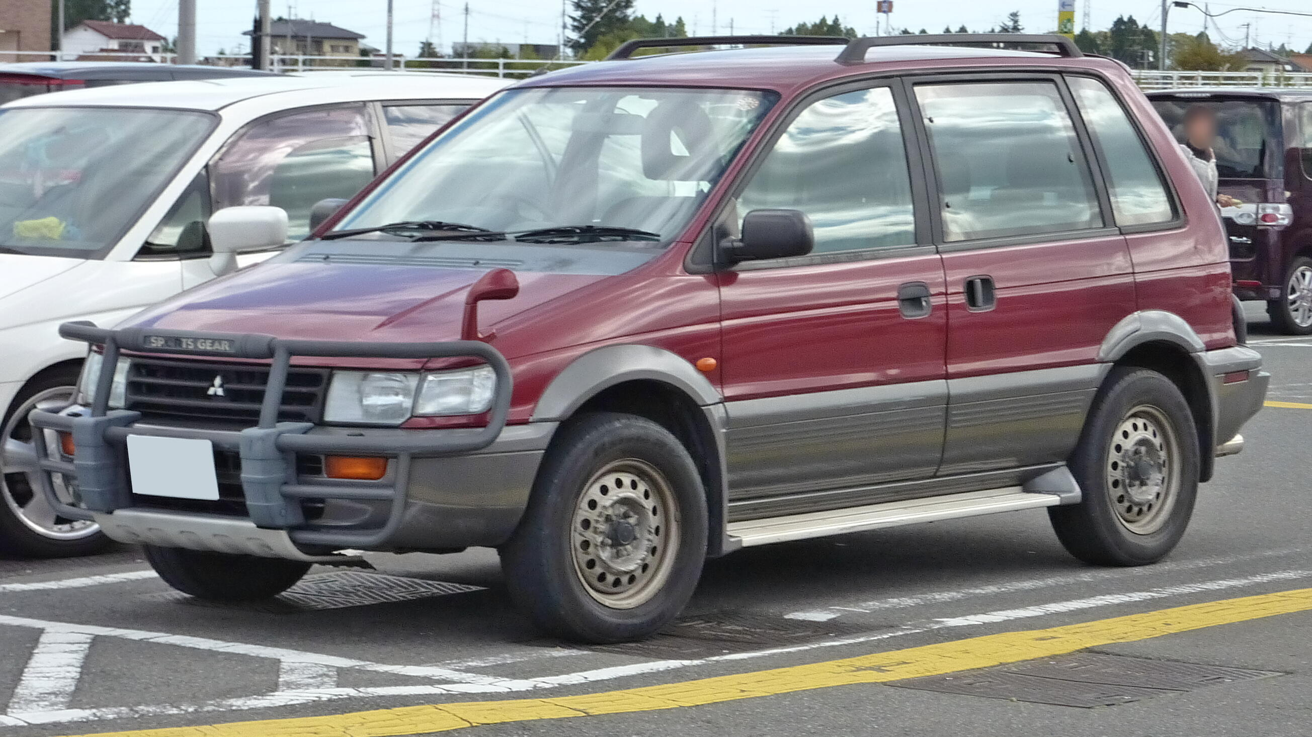 三菱・RVR（初代・スポーツギア）